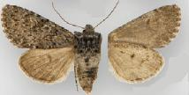 Lasionycta perplexella female